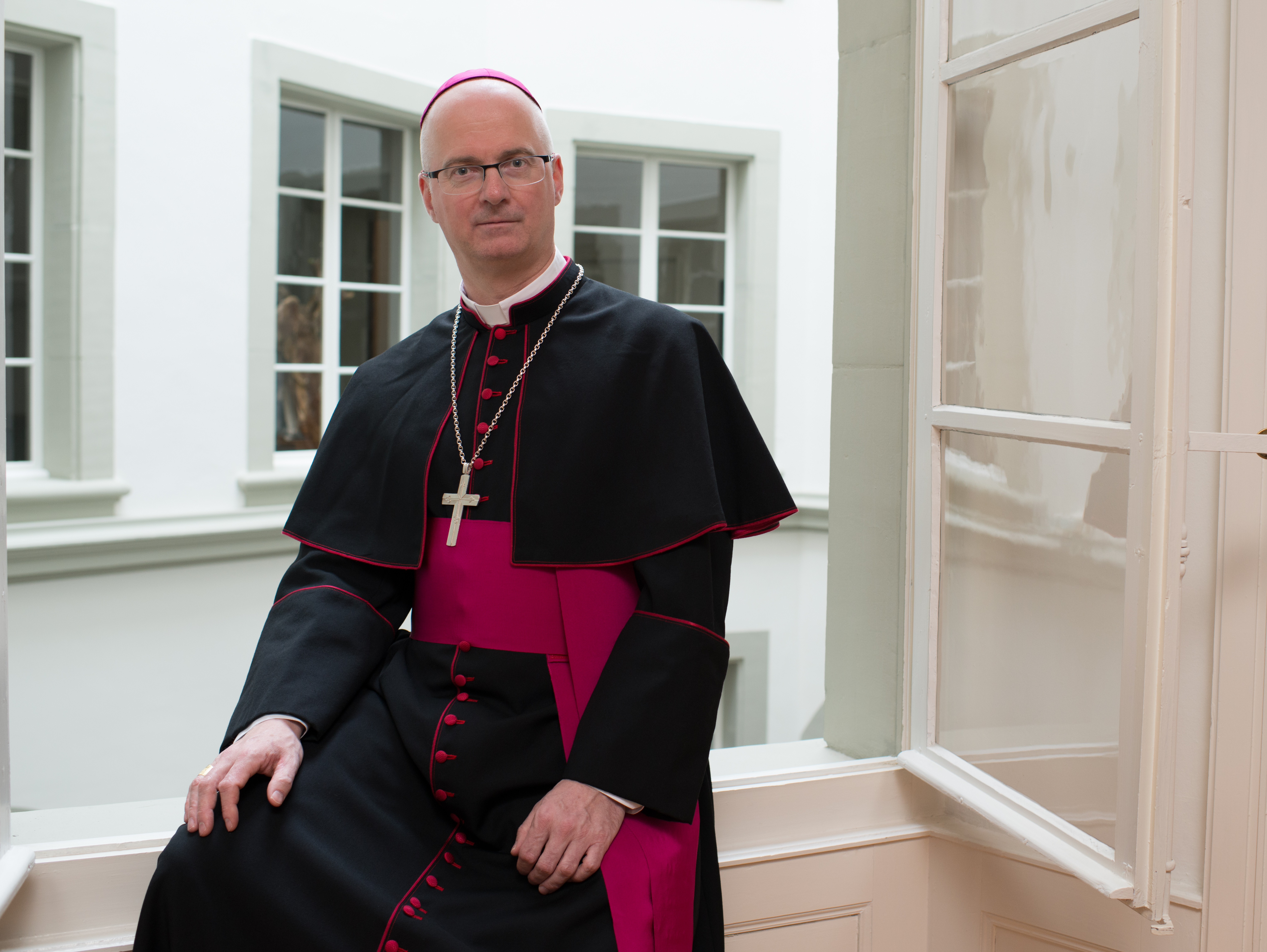 Portrait de Charles Morerod, évêque du diocèse de Lausanne, Genève et Fribourg.